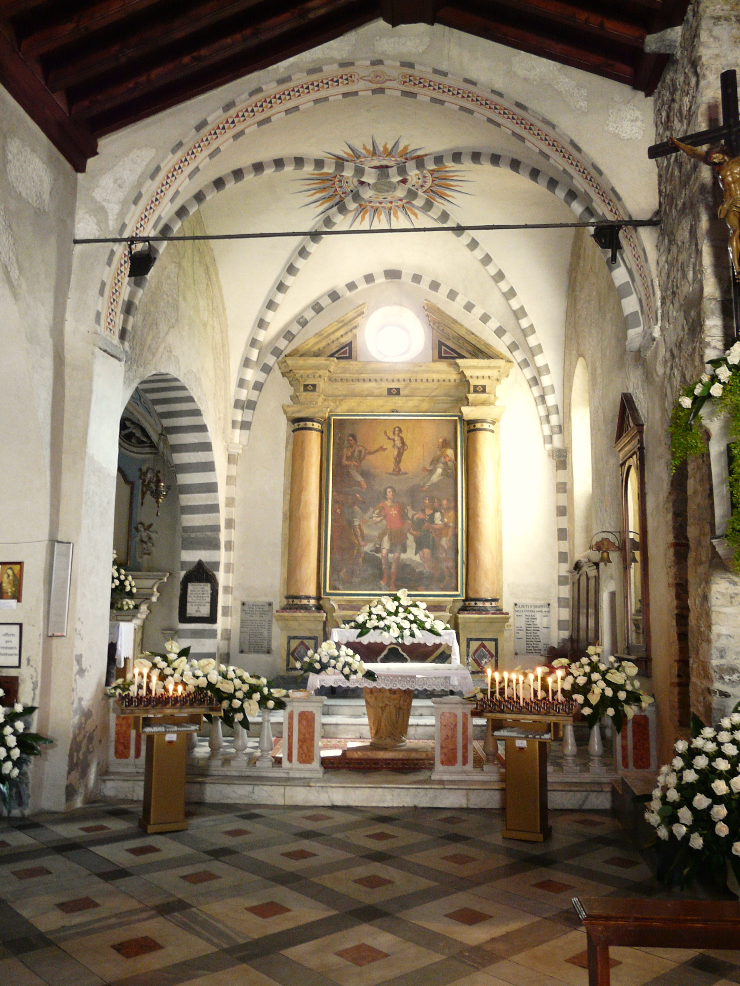 Santuario di Nostra Signora del Buon Consiglio di Riva Ligure, Liguria, Italia